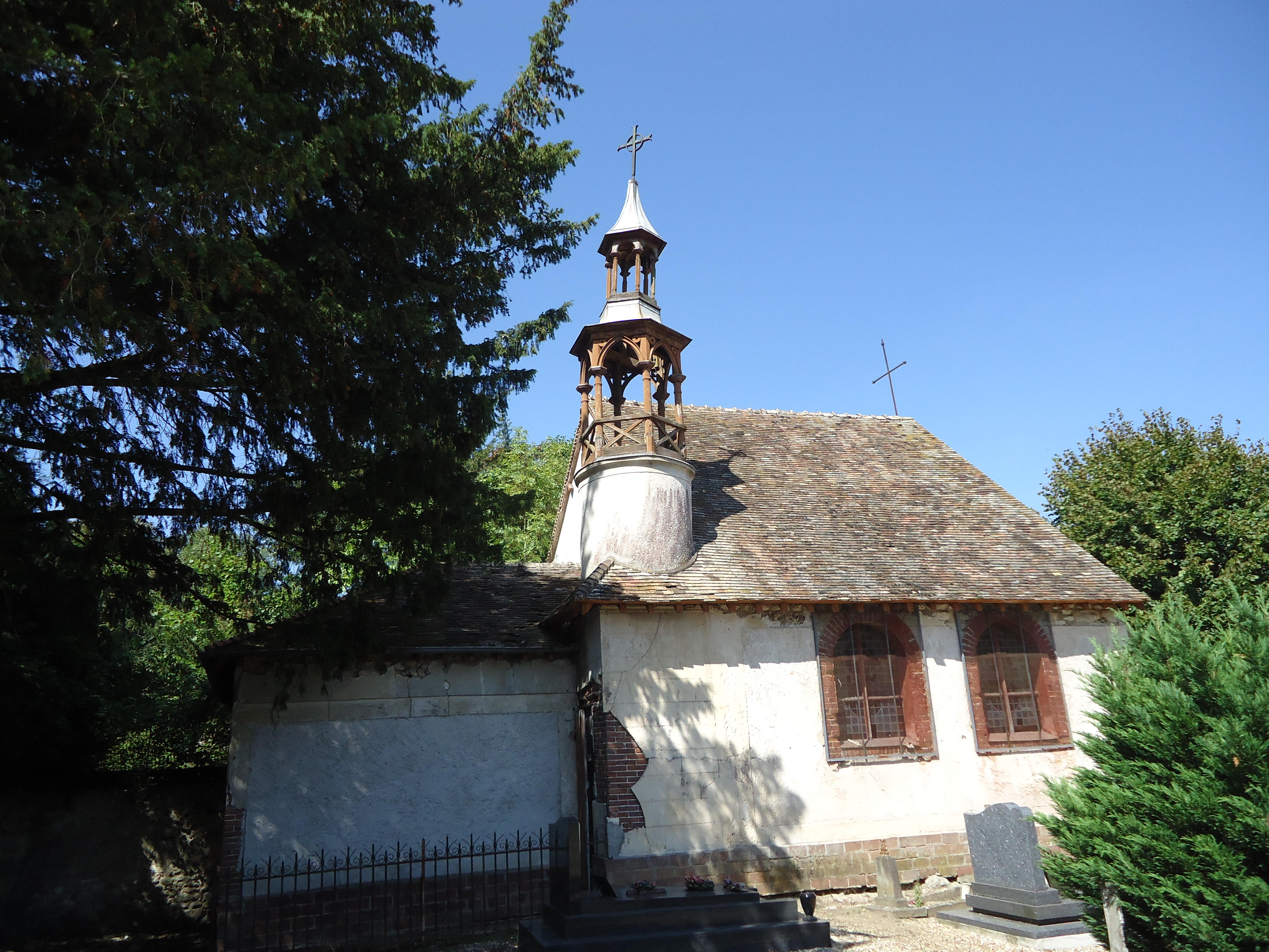 Église Saint-Lubin - Hameau de Lorey - Breuilpont - Eure (27).